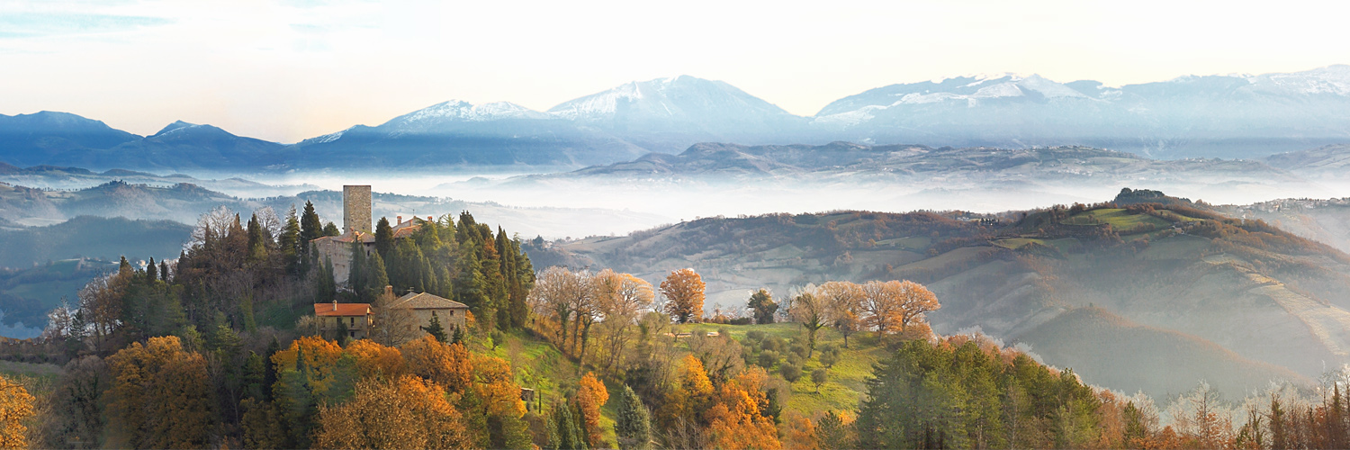 Foto Panoramica del Castello di Petroia.